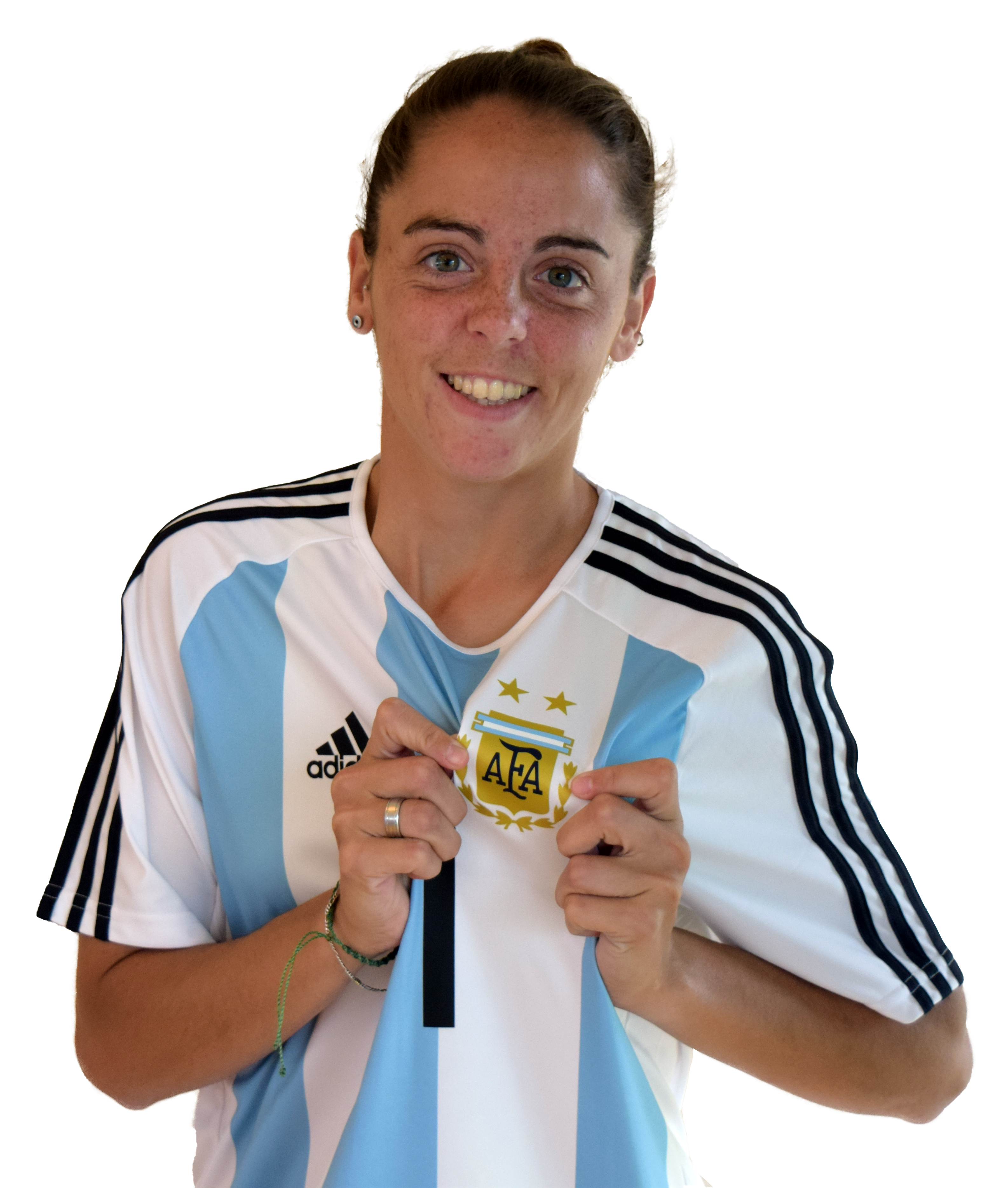 Mariana Larroquette, jugadora de la selección mayor femenina de fútbol de Argentina.Foto sacada previo al primer partido del repechaje por un lugar para el mundial de futbol femenino de Francia 2019